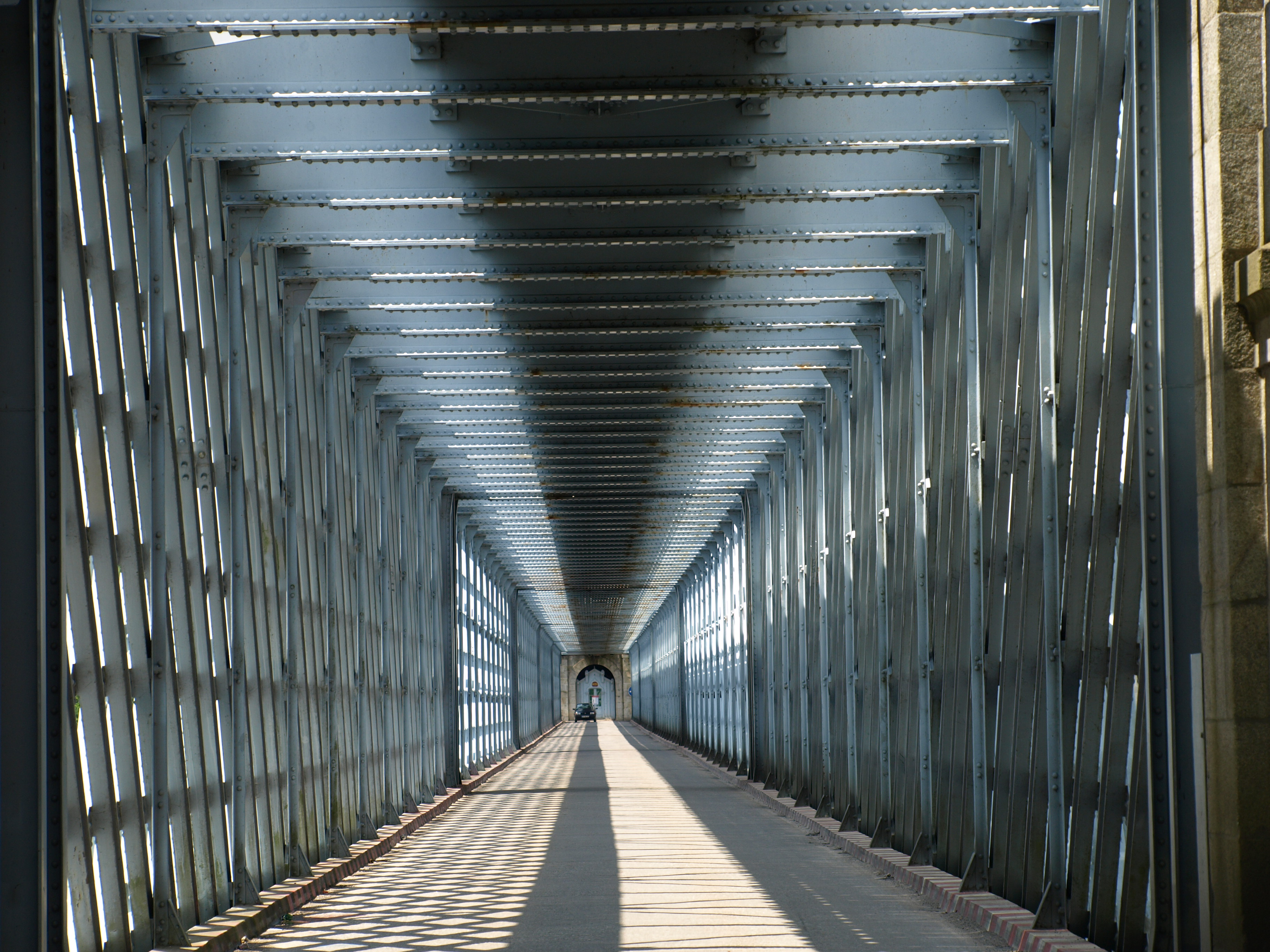 Ponte Internacional Tui, Galicia (Spain) - Valença, Portugal